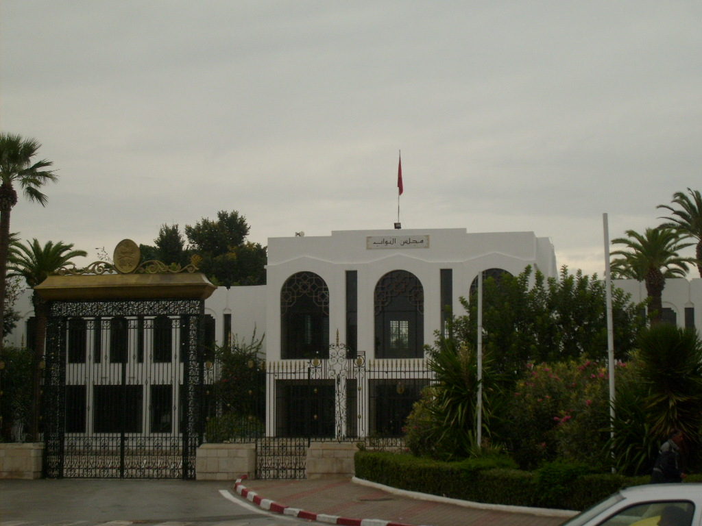 Siège de la Chambre des députés situé au Bardo près de Tunis (Tunisie)